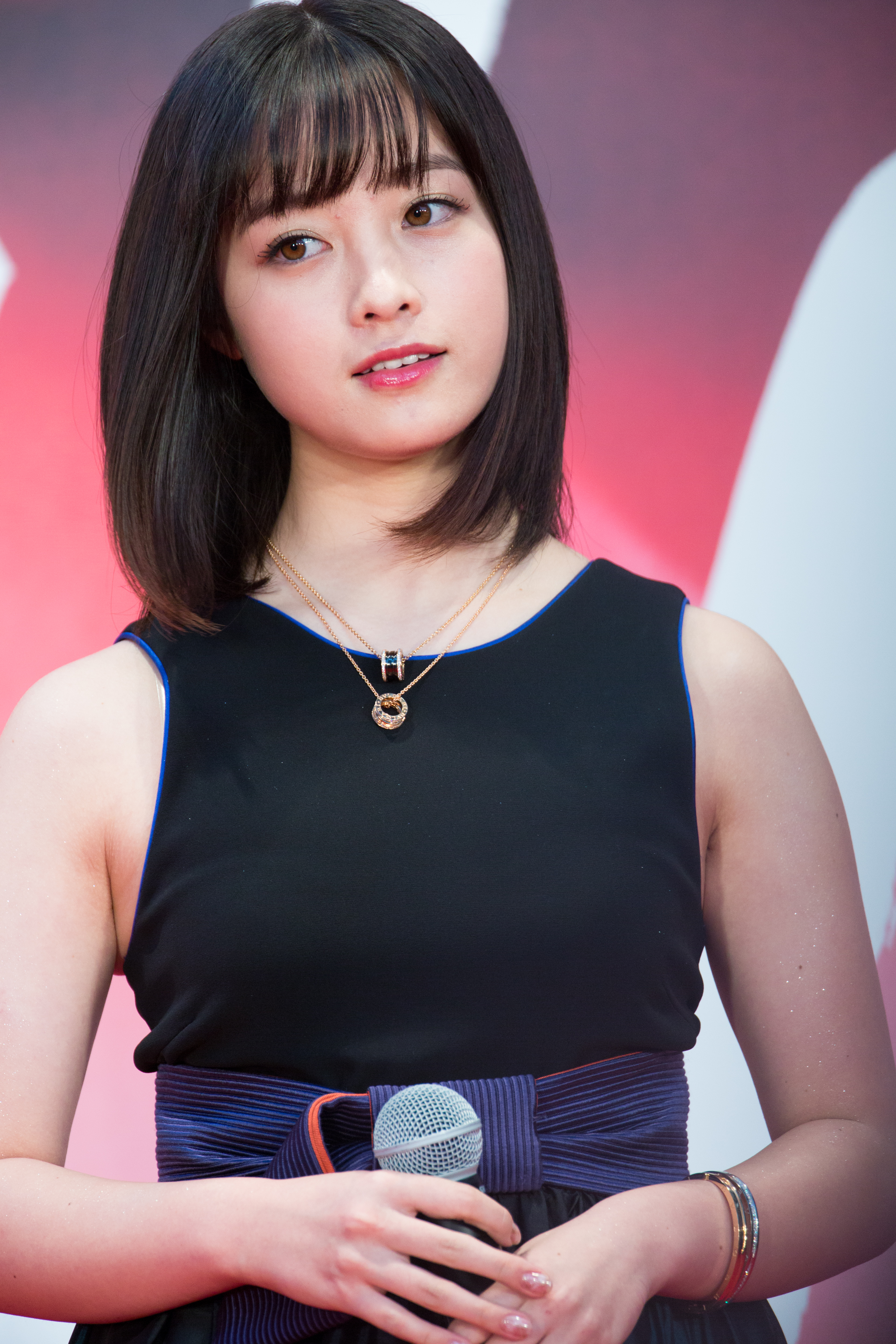 第30回 東京国際映画祭 オープニングセレモニー 橋本環奈